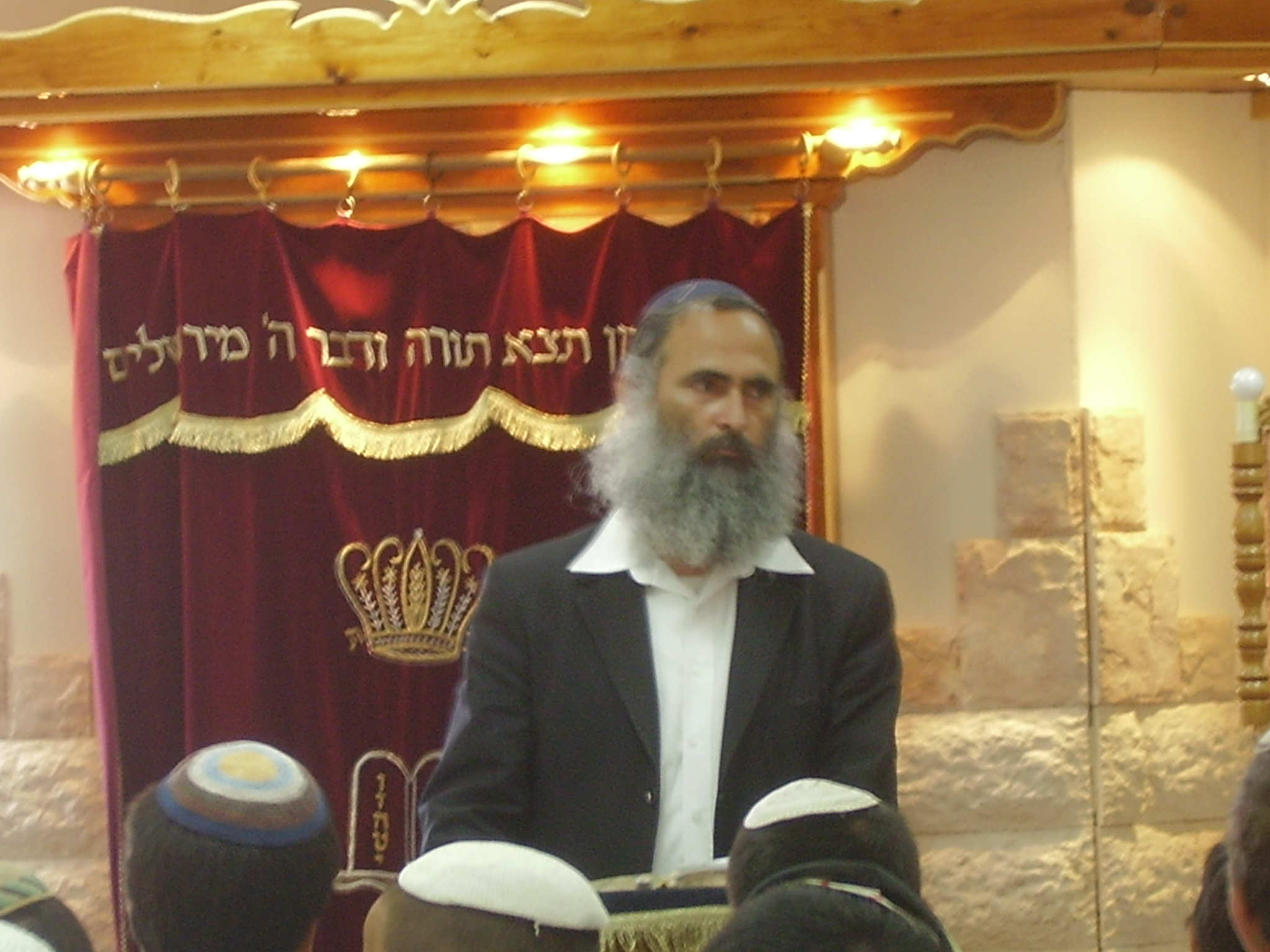 הרב דוד אביחיל,ראש הישיבה הקודם.